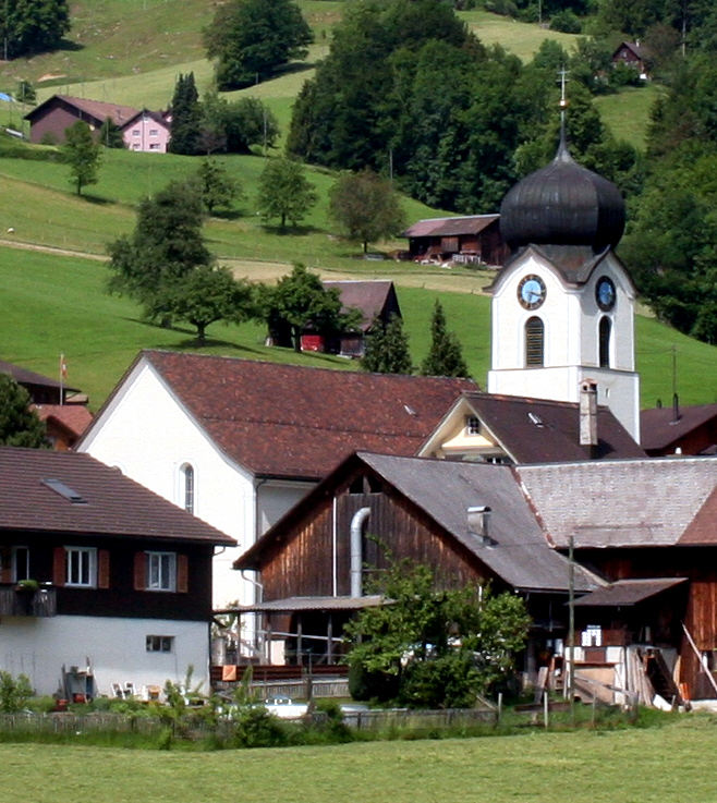 Maseltrangen